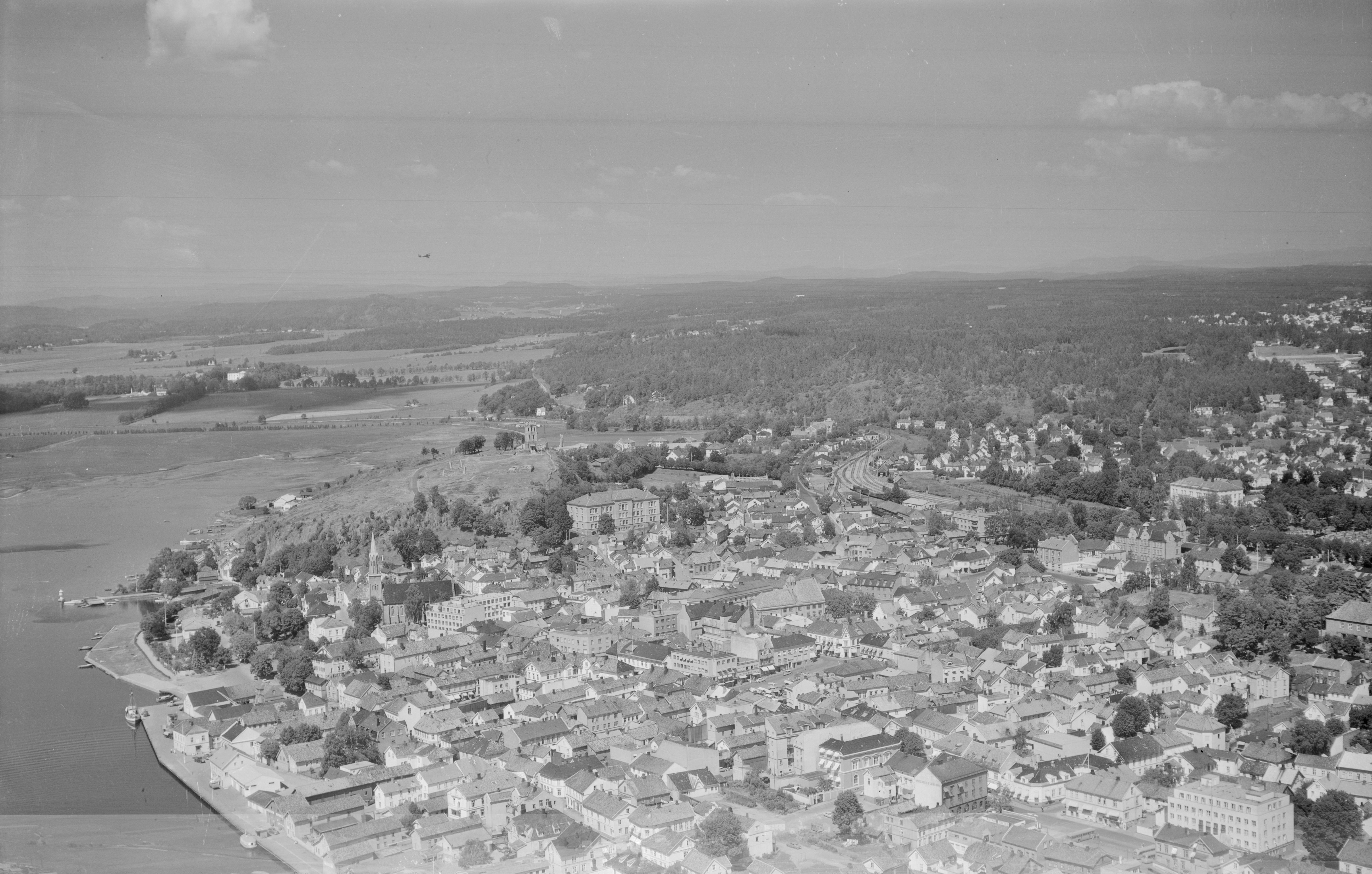 FW.S.118383